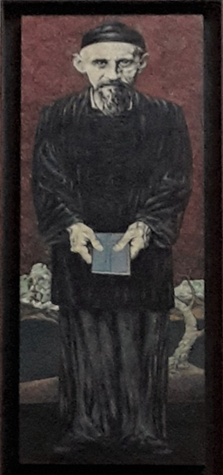 Chiesa parrocchiale di Millan - Josef Freinademetz